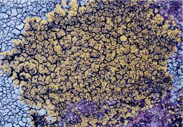 Candelariella vitellina